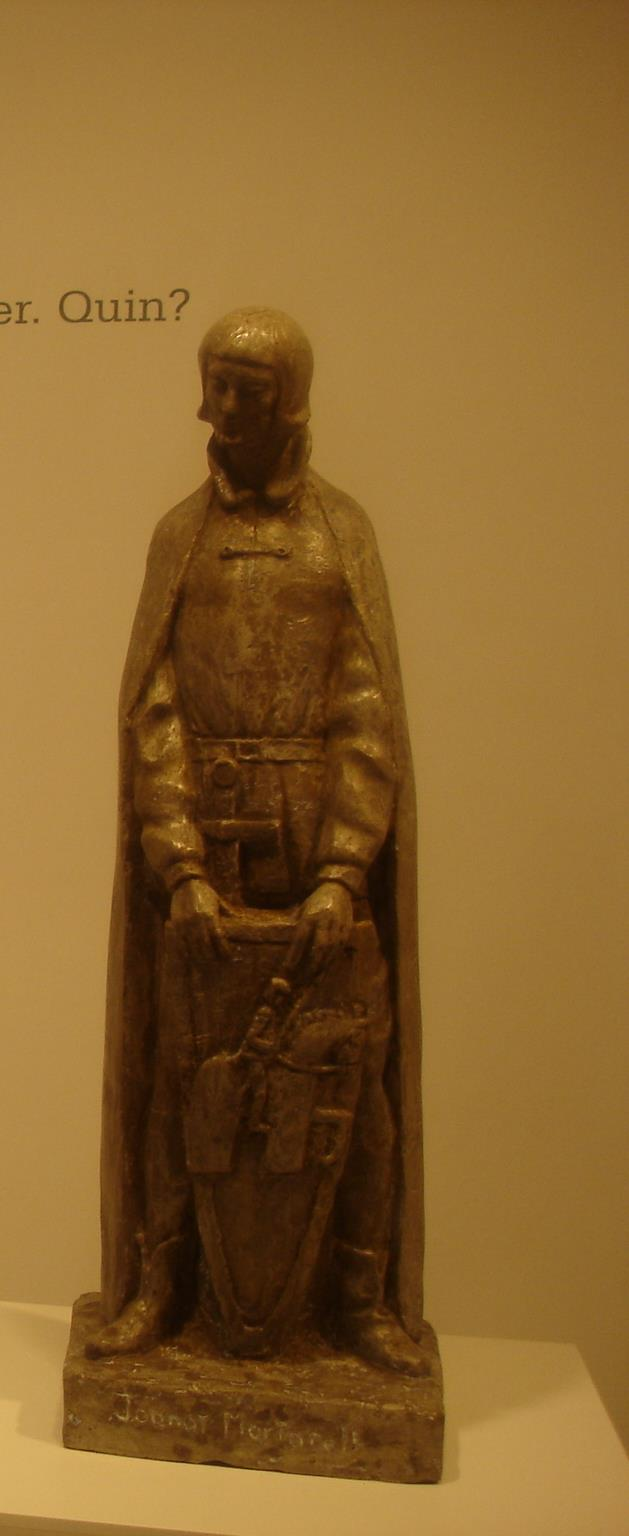 Escultura de Joanot Martorell de J.Rausell.